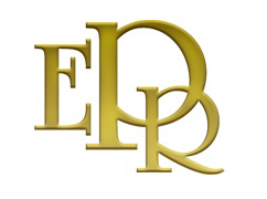 Logo de EPR: Evancic Perrault Robinson